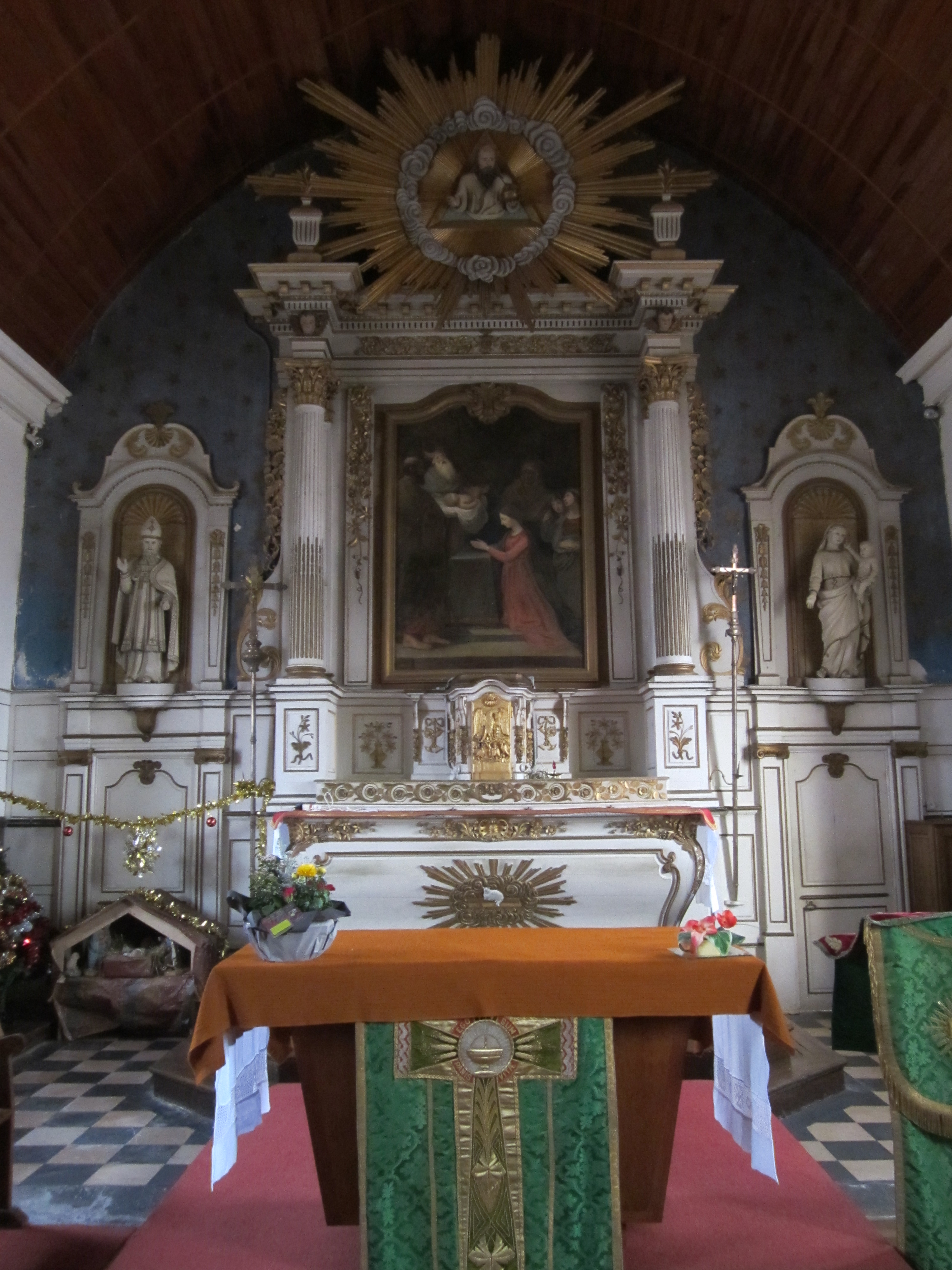 Saint-Martin-de-Cenilly, Manche